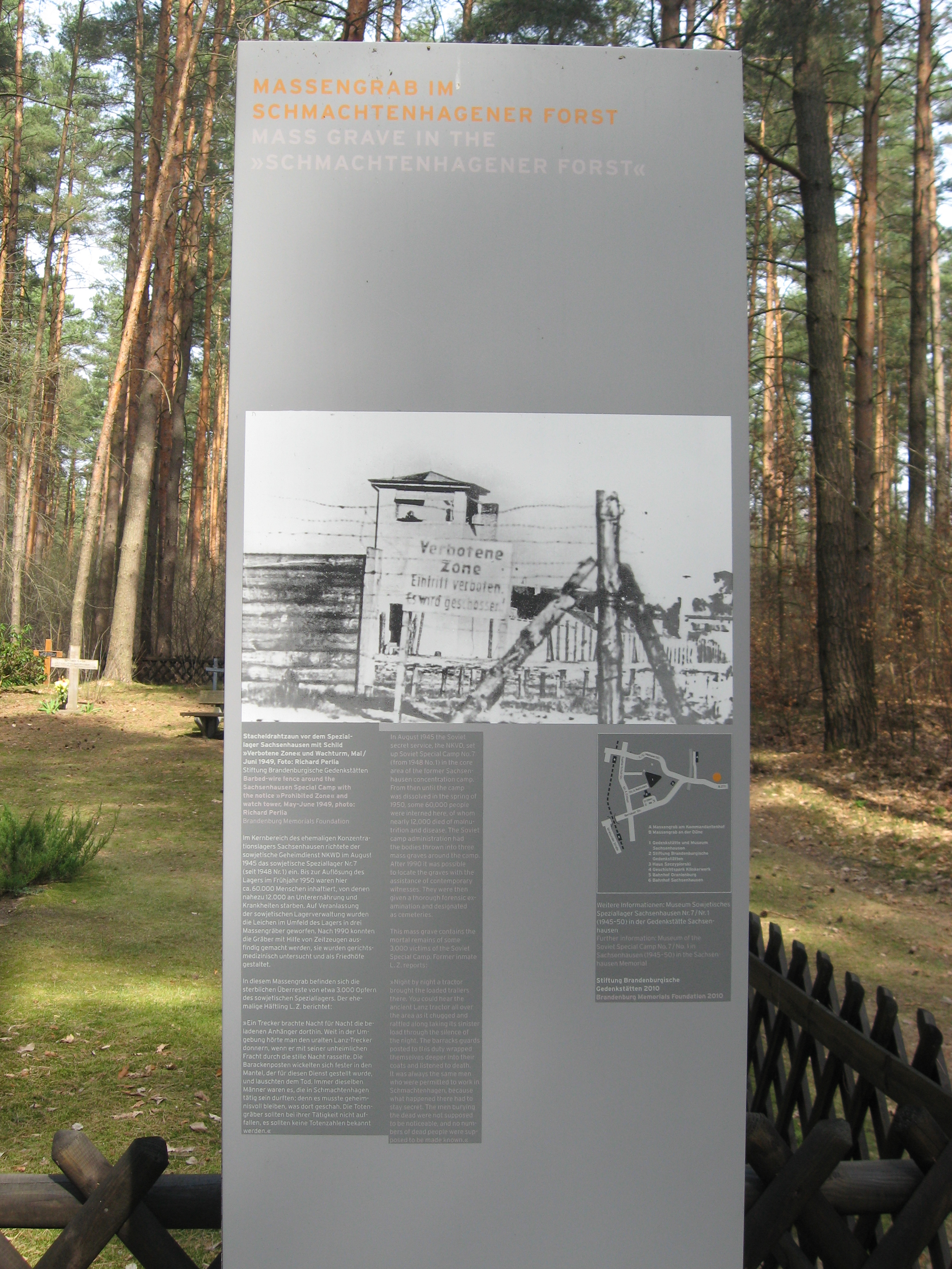 Informationssäule Waldfriedhof für das Speziallager Nr. 7 im Wald zwischen Oranienburg und Schmachtenhagen